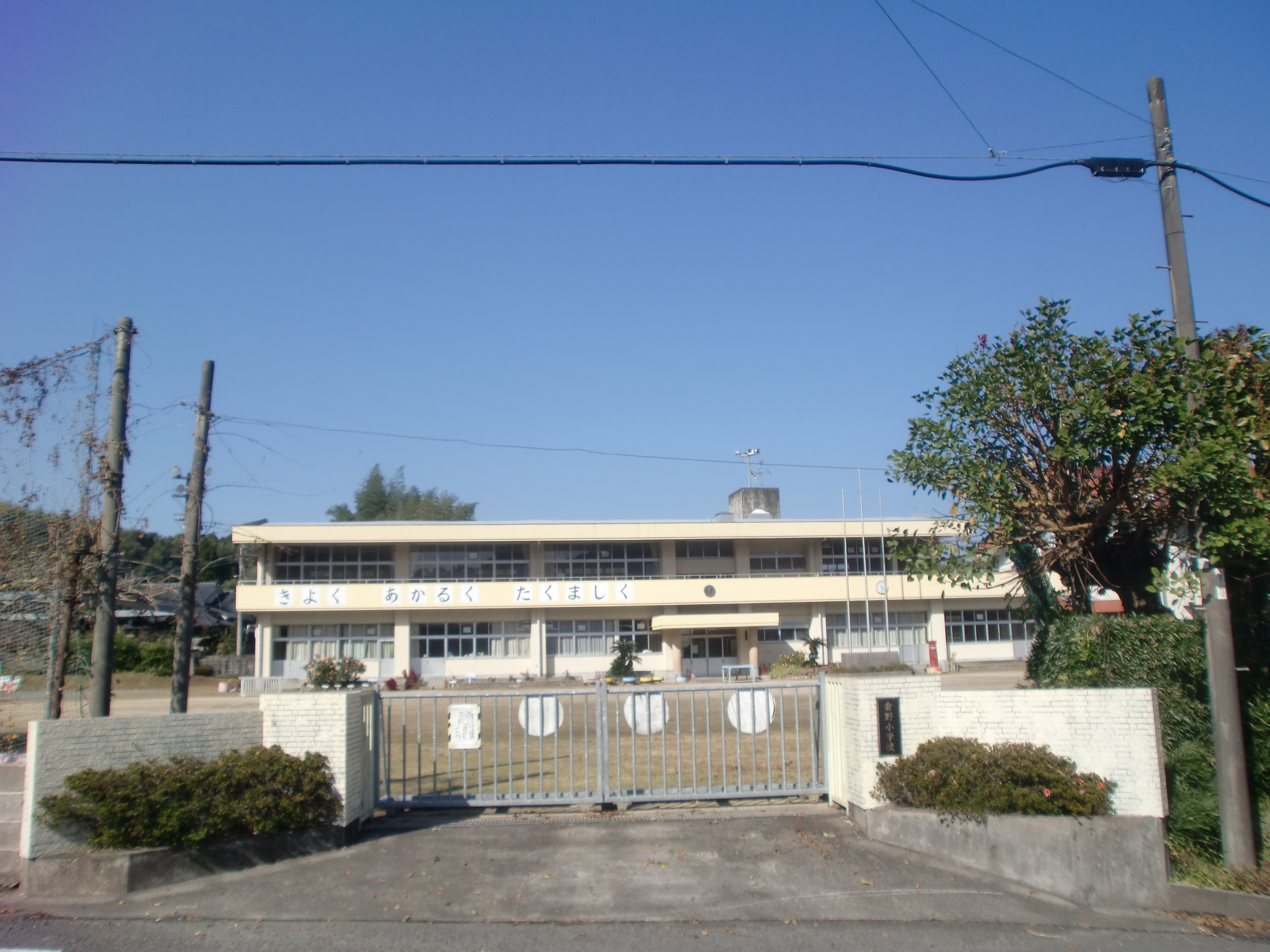 薩摩川内市立倉野小学校跡地。2010年に廃校。